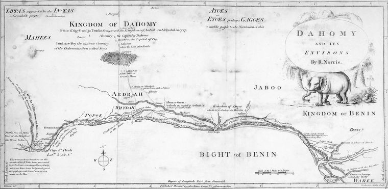 Dahomy and its environs by R. Norris